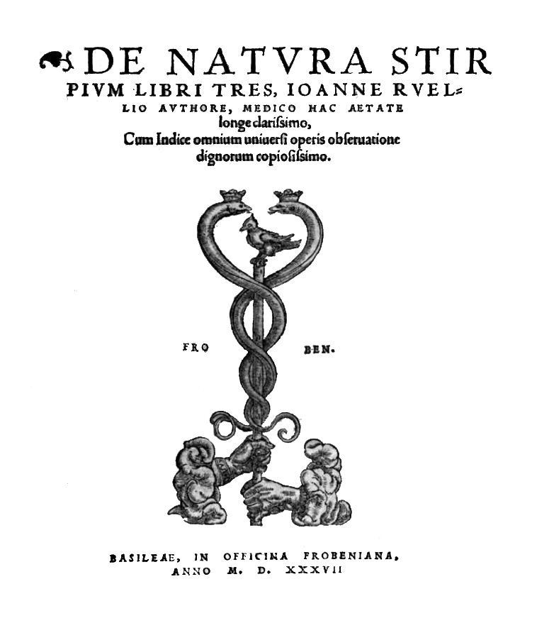 Titelblatt